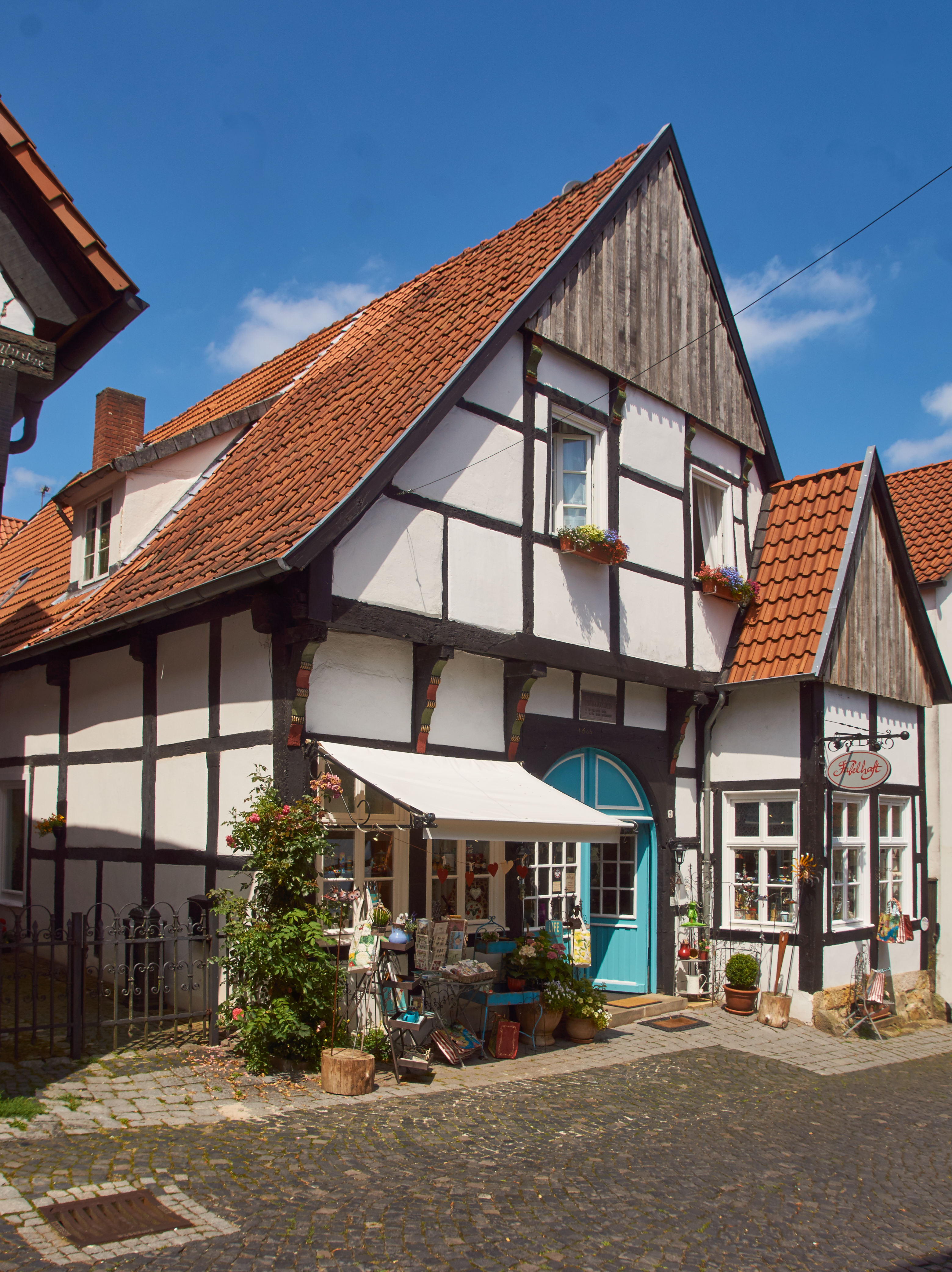 Vierständerbau in der Krummacherstraße 2, Tecklenburg. This is a photograph of an architectural monument.